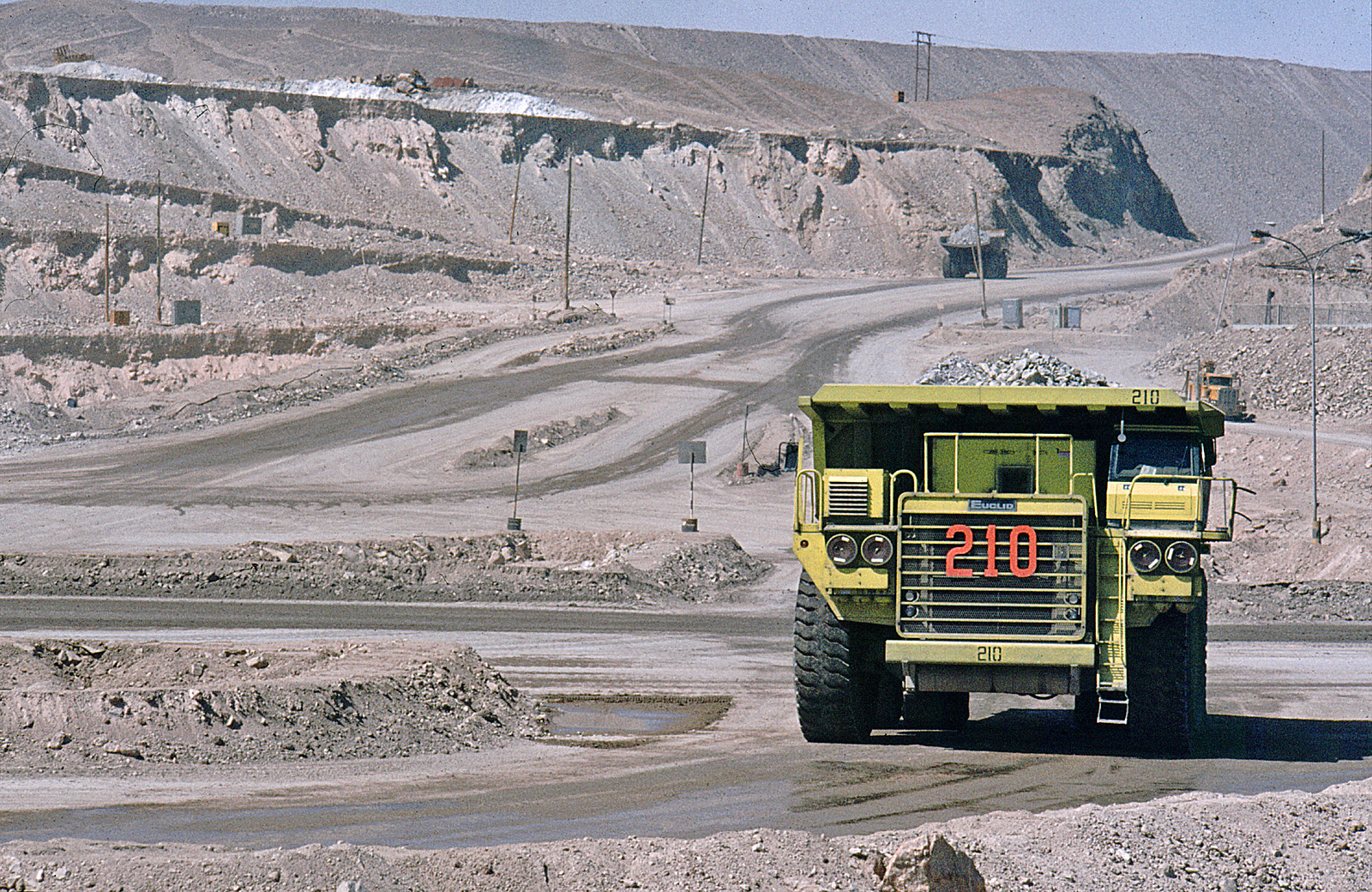 Coppermine Chuquicamata, Chile